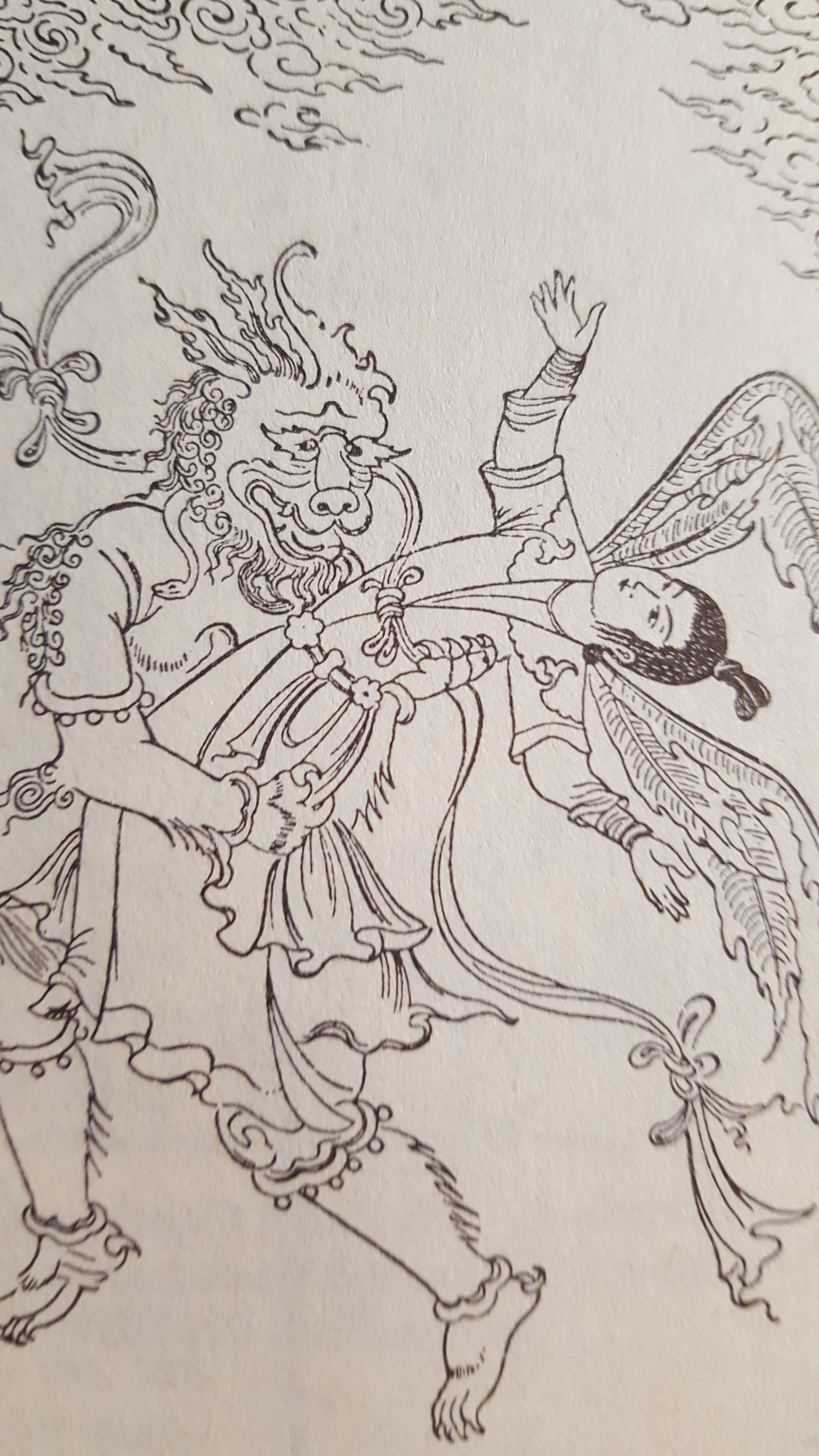 Dew, Dämon oder böser Geist aus der Hölle, einen Peri entführend.